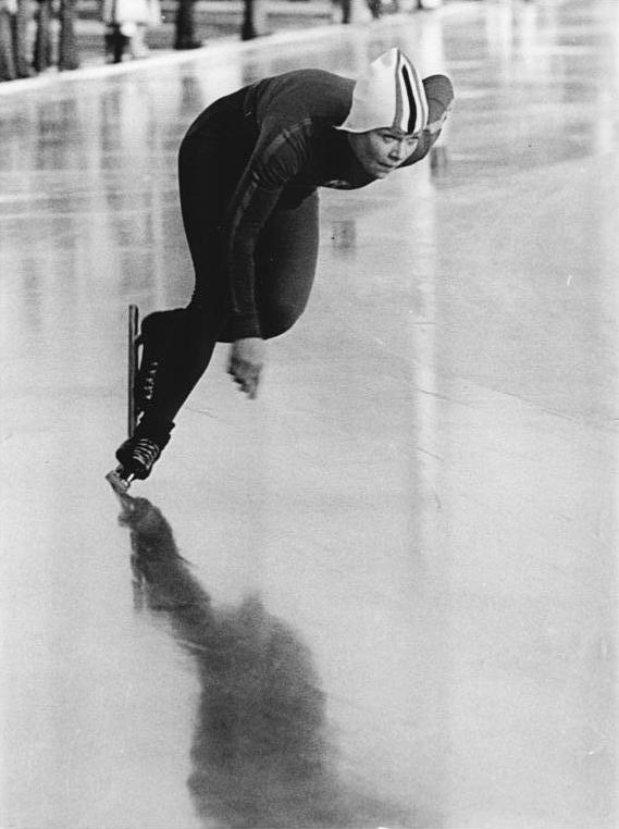 Heike Lange ADN-ZB Thieme 29.12.74 Berlin: Heike Lange neue Titelträgerin-Als beste Sprinterin dieser Saison erwies sich erneut die 19jährige Heike Lange vom SC Dynamo Berlin (Foto von einem früheren Wettkampf). Bei den DDR-Meisterschaften der Eisschnelläufer im Sprint-Mehrkampf am 28. u. 29.12.74 im Berliner Sportforum wurde sie mit 191,670 Punkten neue Titelträgerin. Abgebildete Personen: Lange, Heike: Eisschnelläuferin, DDR